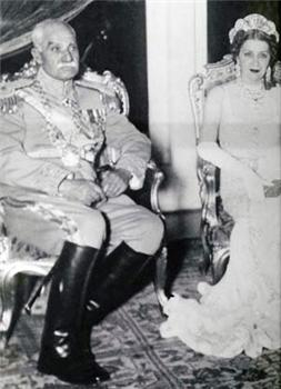 Reza Chah et la reine Nazli lors du mariage de Faouzia Fouad et de Mohmmad Reza Pahlavi, le 25 avril 1939